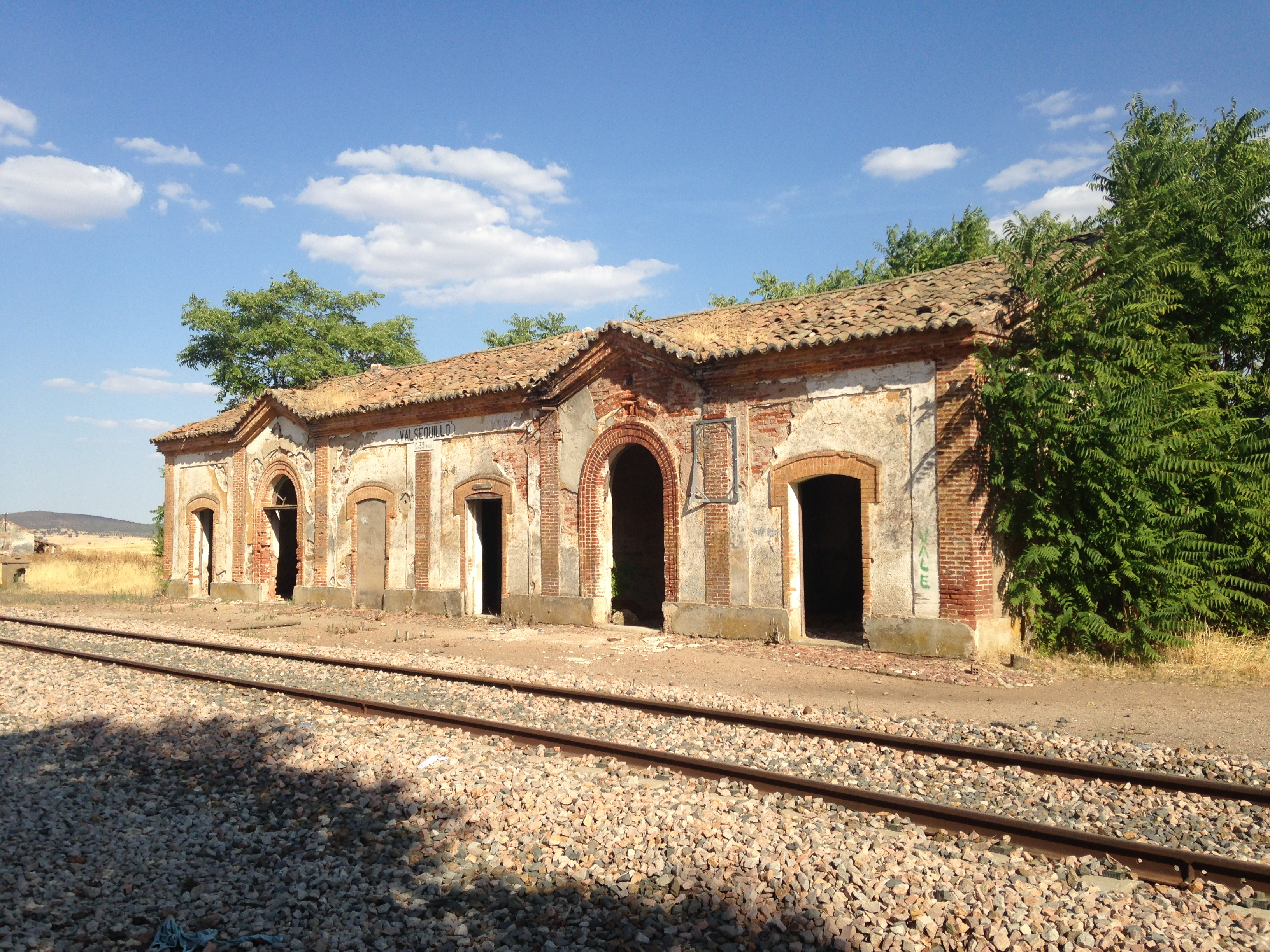 Estación ferroviaria de Valsequillo en Córdoba